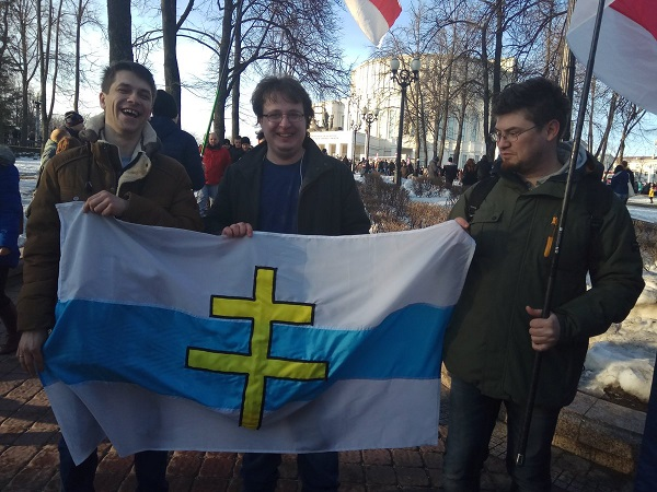 Беларуская (тарашкевіца): Дэпутаты сойму Вейшнорыі маюць удзел у адзначэньні 100 годзя БНР